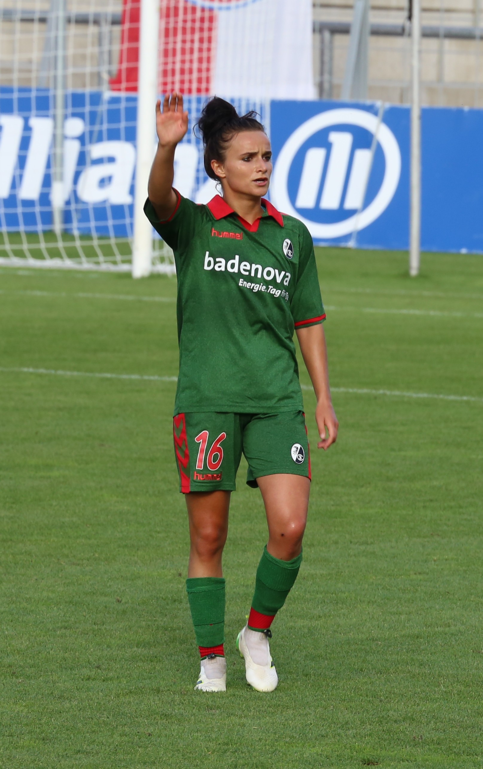 Lina Magull, SC Freiburg, beim Frauen-Bundesliga-Spiel FC Bayern München gegen SC Freiburg am 3. September 2016 im Stadion an der Grünwalder Straße (Ergebnis war 1:1).